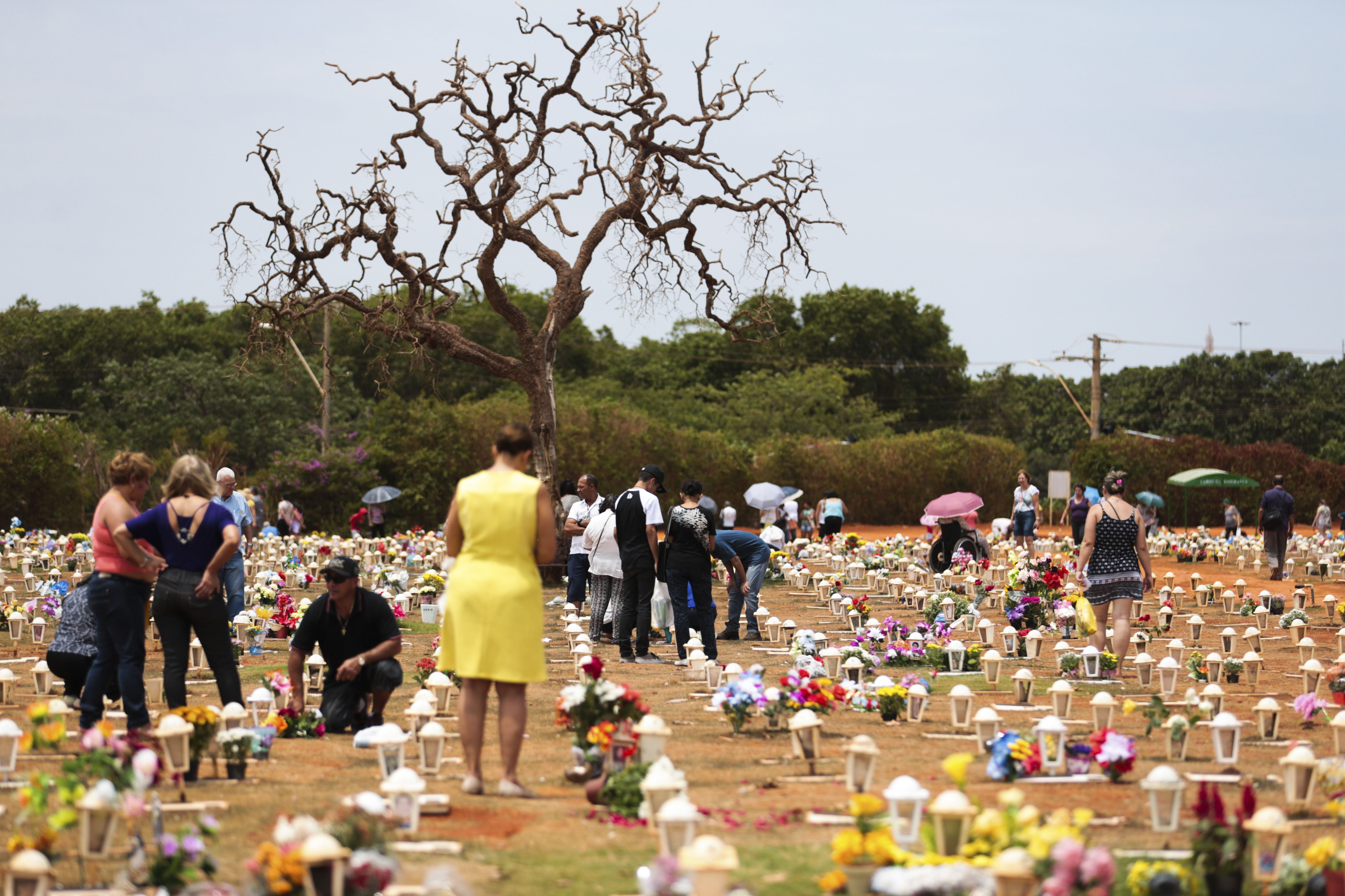 Brasília - Visitação ao cemitério Campo da Esperança no Dia de Finados, em Brasília